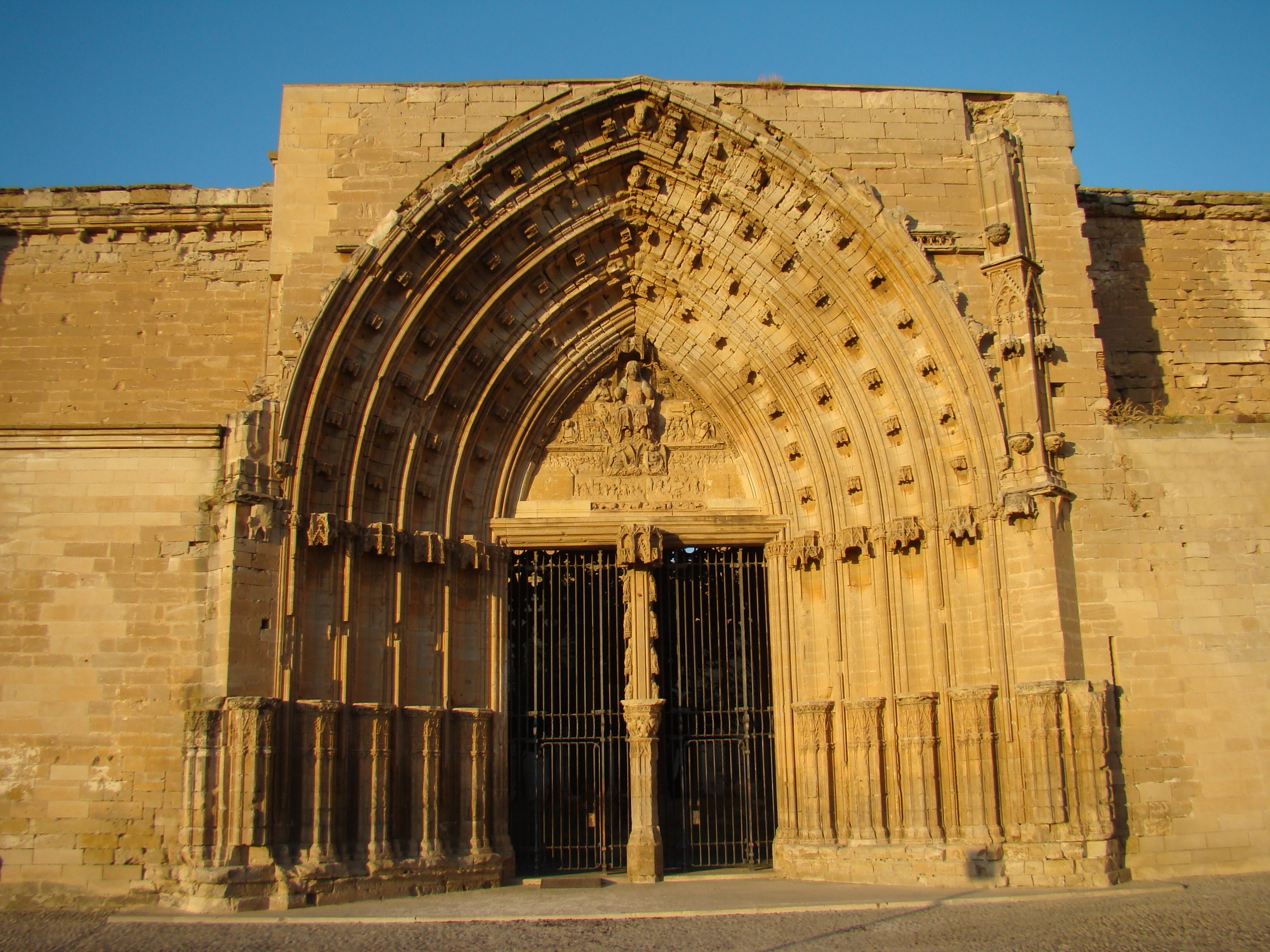 BCIN 144-MH